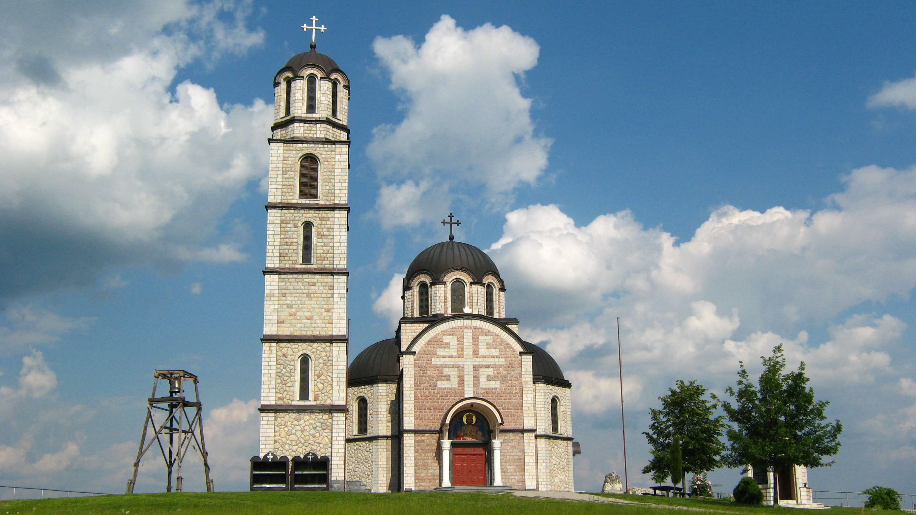 Горња Радња, Теслић, Република Српска